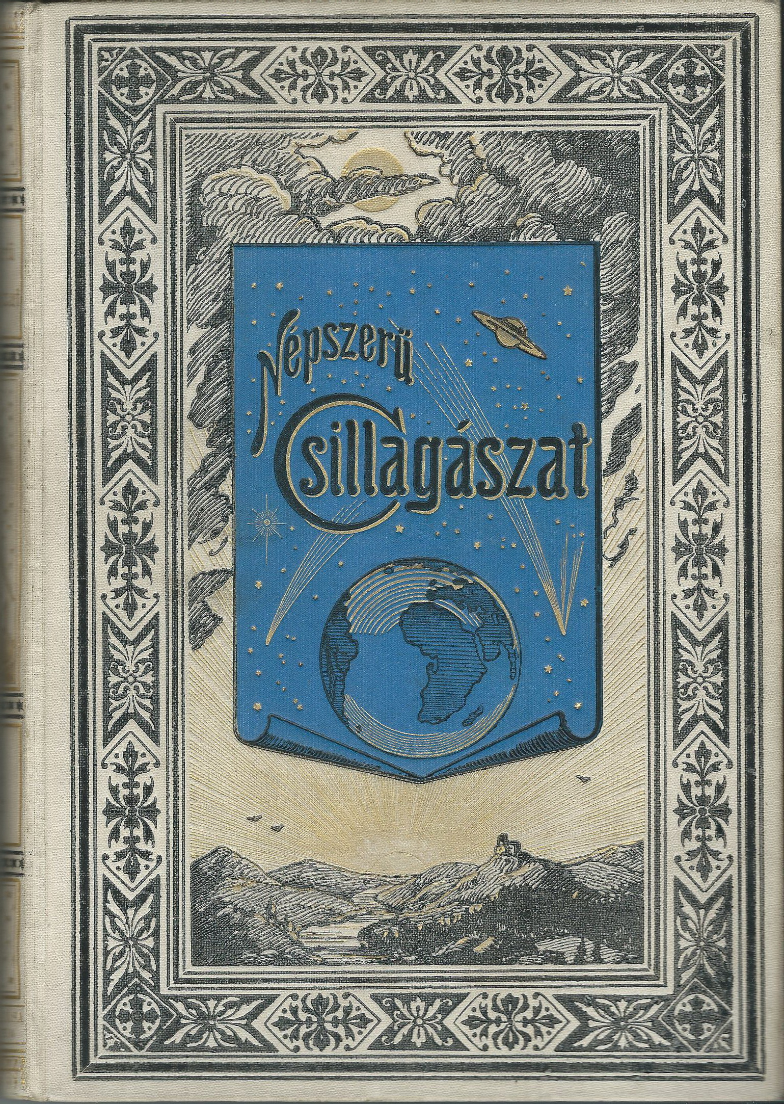 Camille Flammarion: Népszerű csillagászat c. művének 1900-as magyar kiadása (Pallas kiadása Budapesten)